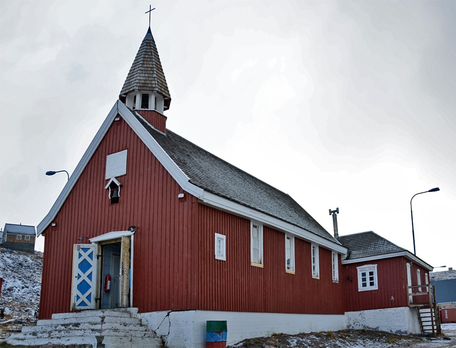 Kirche von Ittoqqortoormiit / Scoresbysund